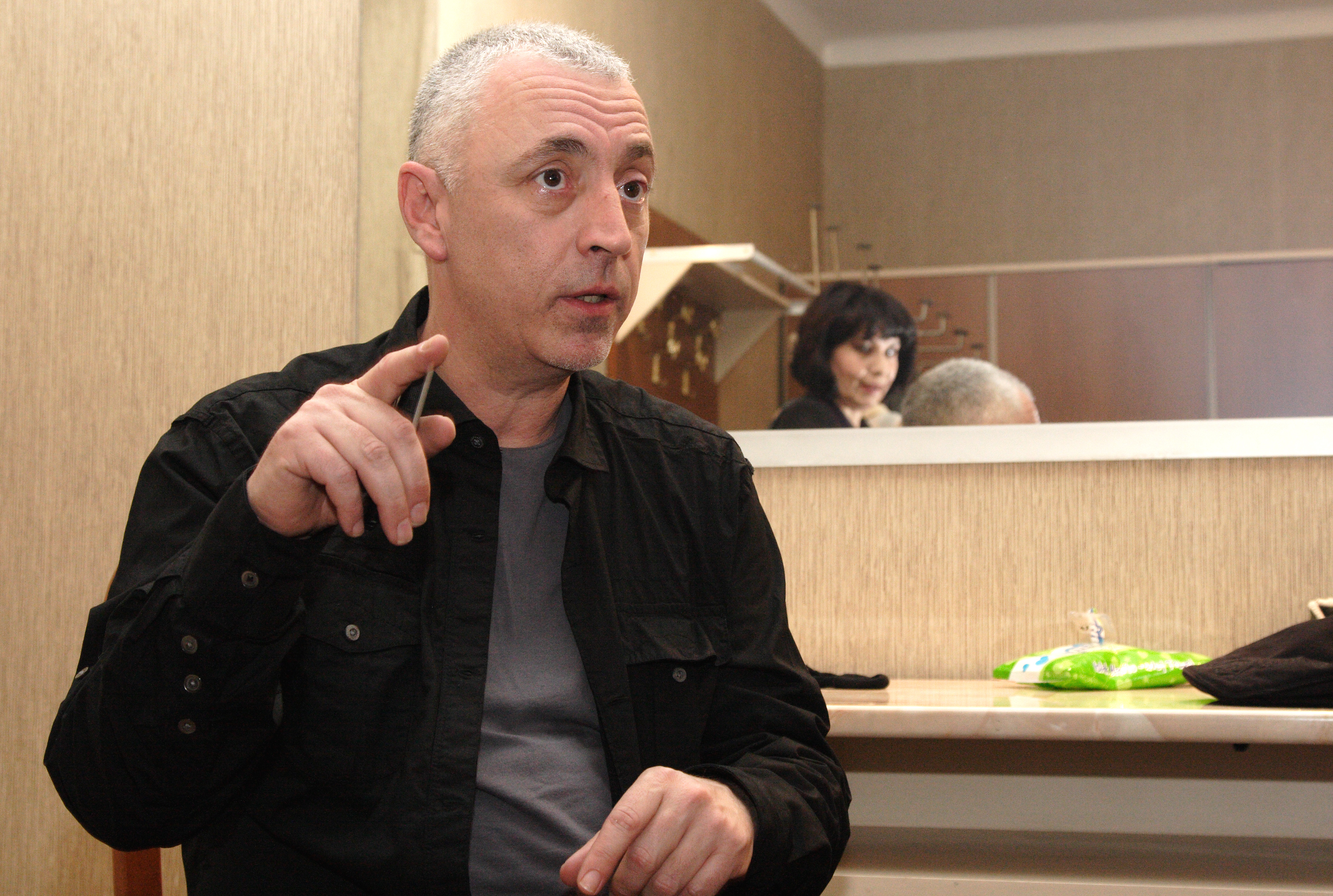 מיטקו על הסט של "בלי נוסטלגיה"-צלם שרה בוזקוב 2006